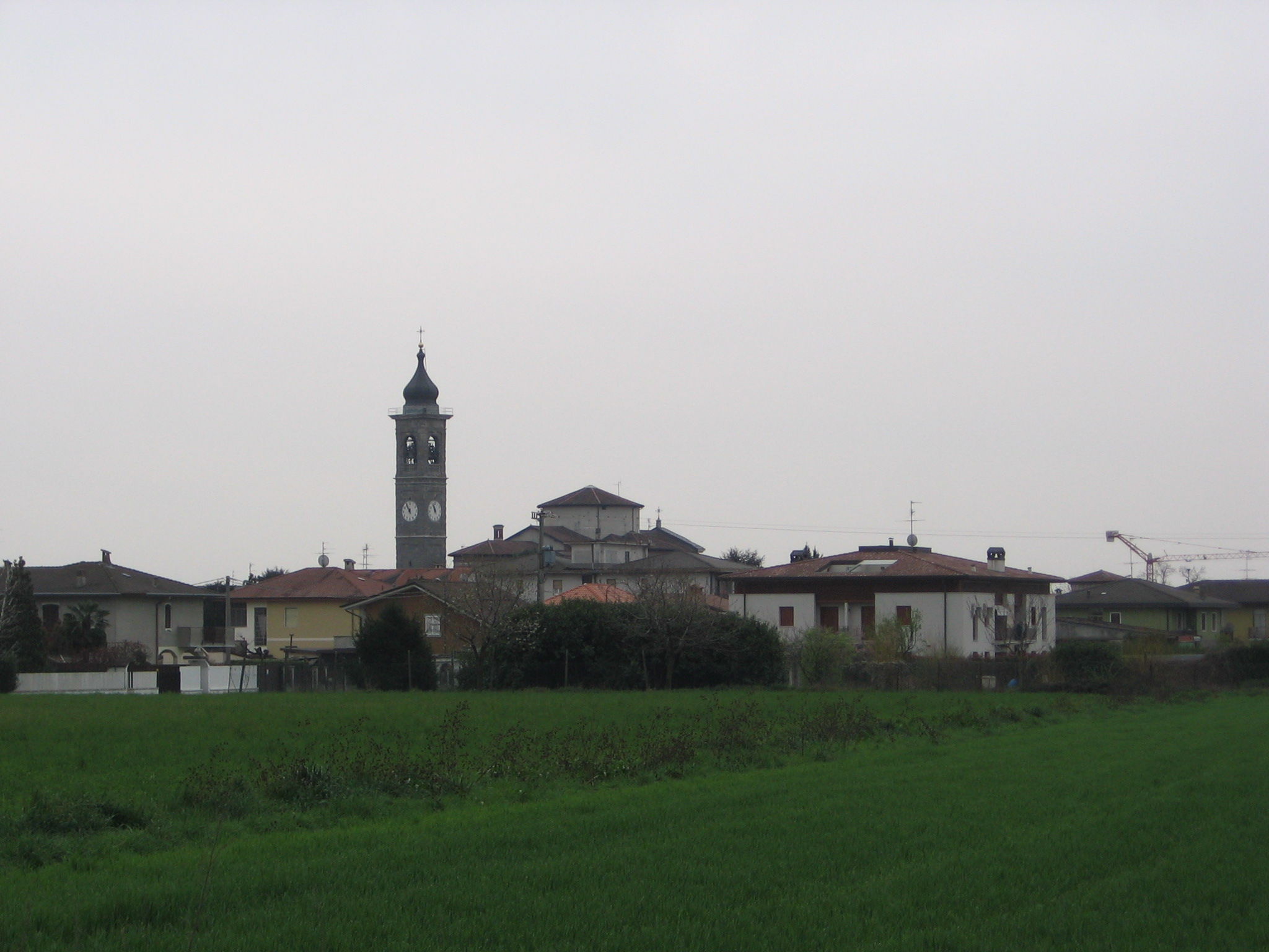 Mornico al Serio, Bergamo, Italia